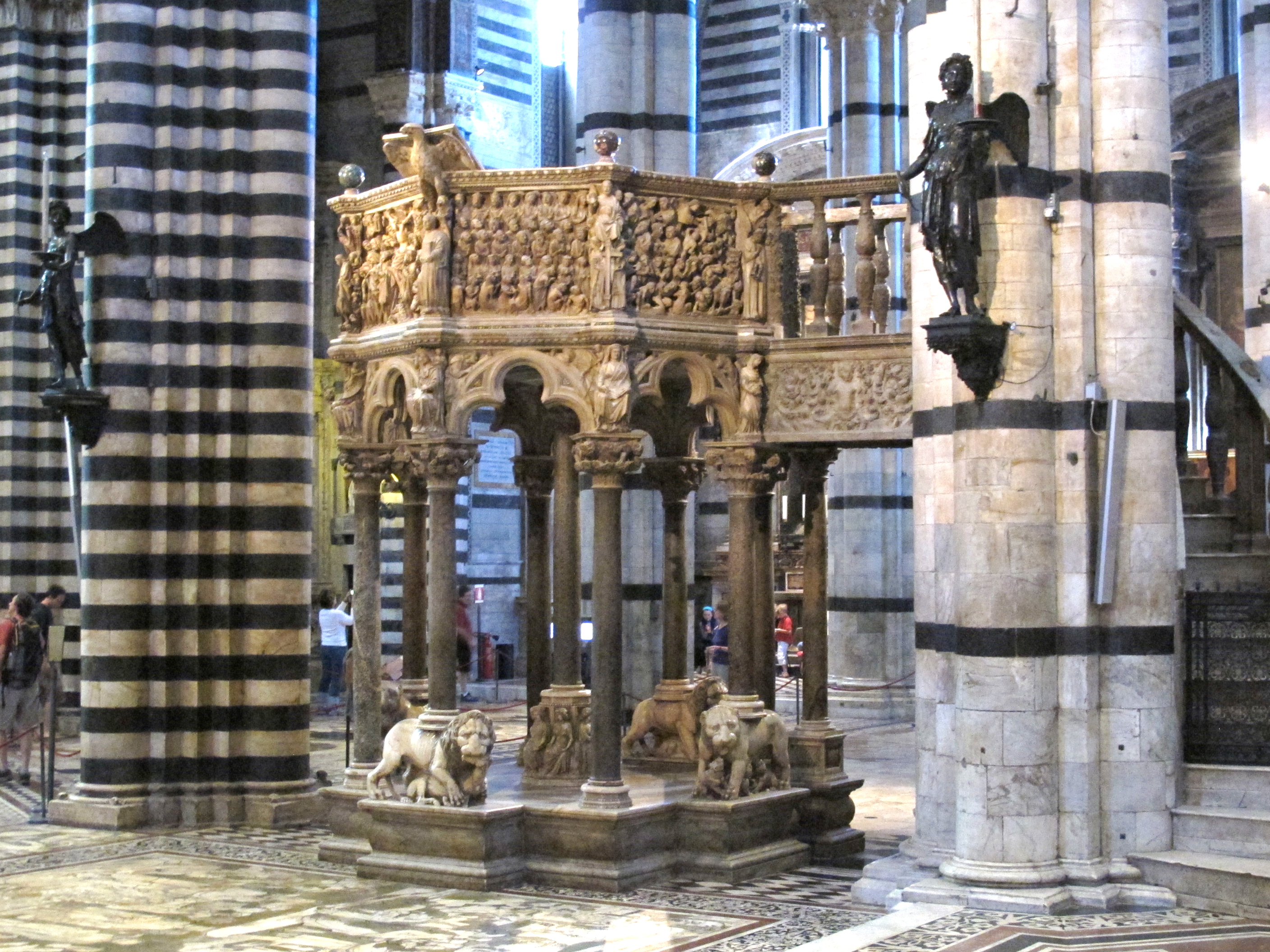 Pulpito del duomo di Siena